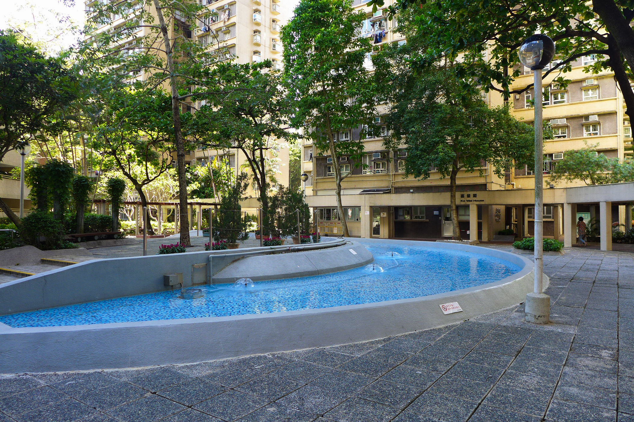 Ka Keng Court Fountain